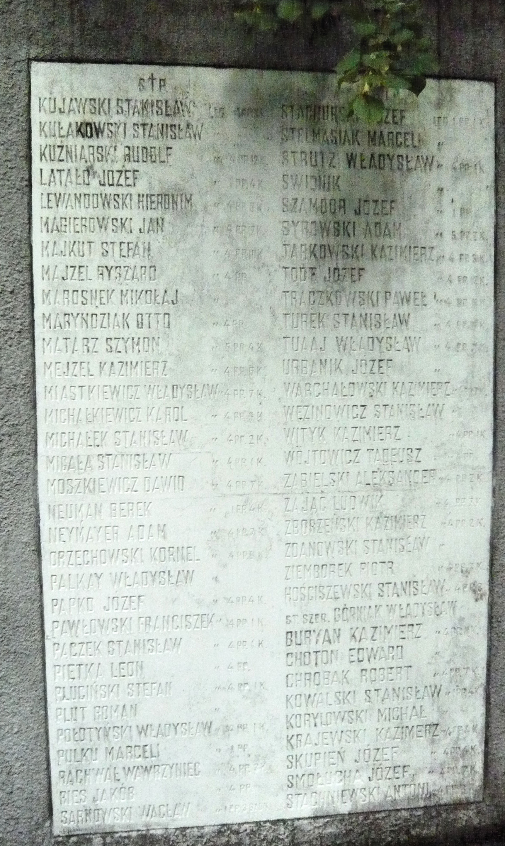 Tablica na pomniku Legionistów w Jastkowie